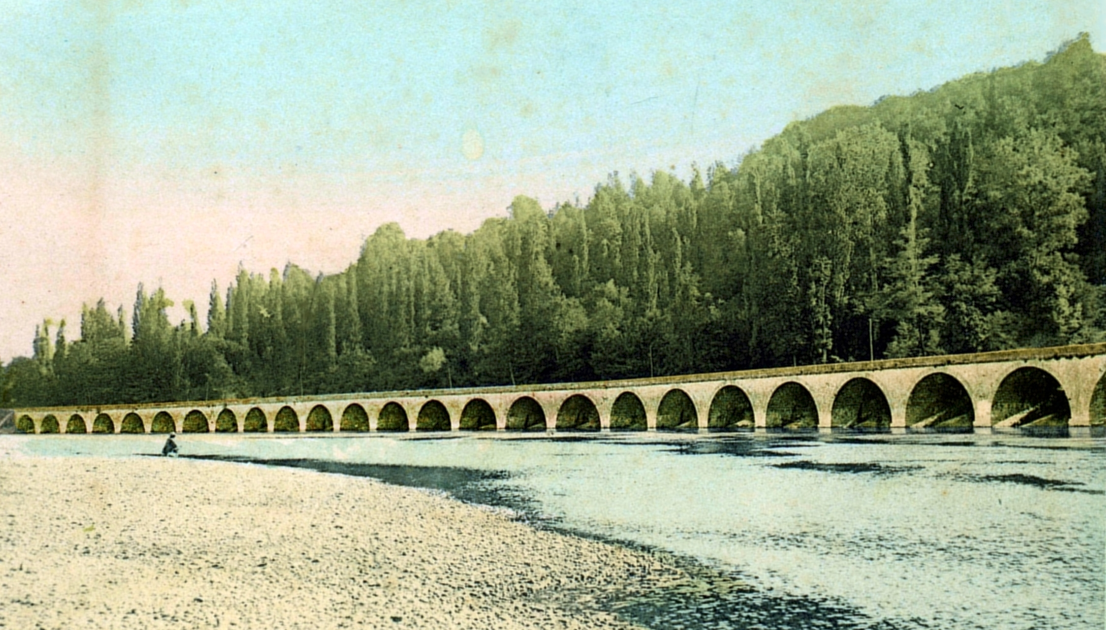 Carte postale colorisée de 1903 représentant le Viaduc du Mignon commune de Le Fleix.